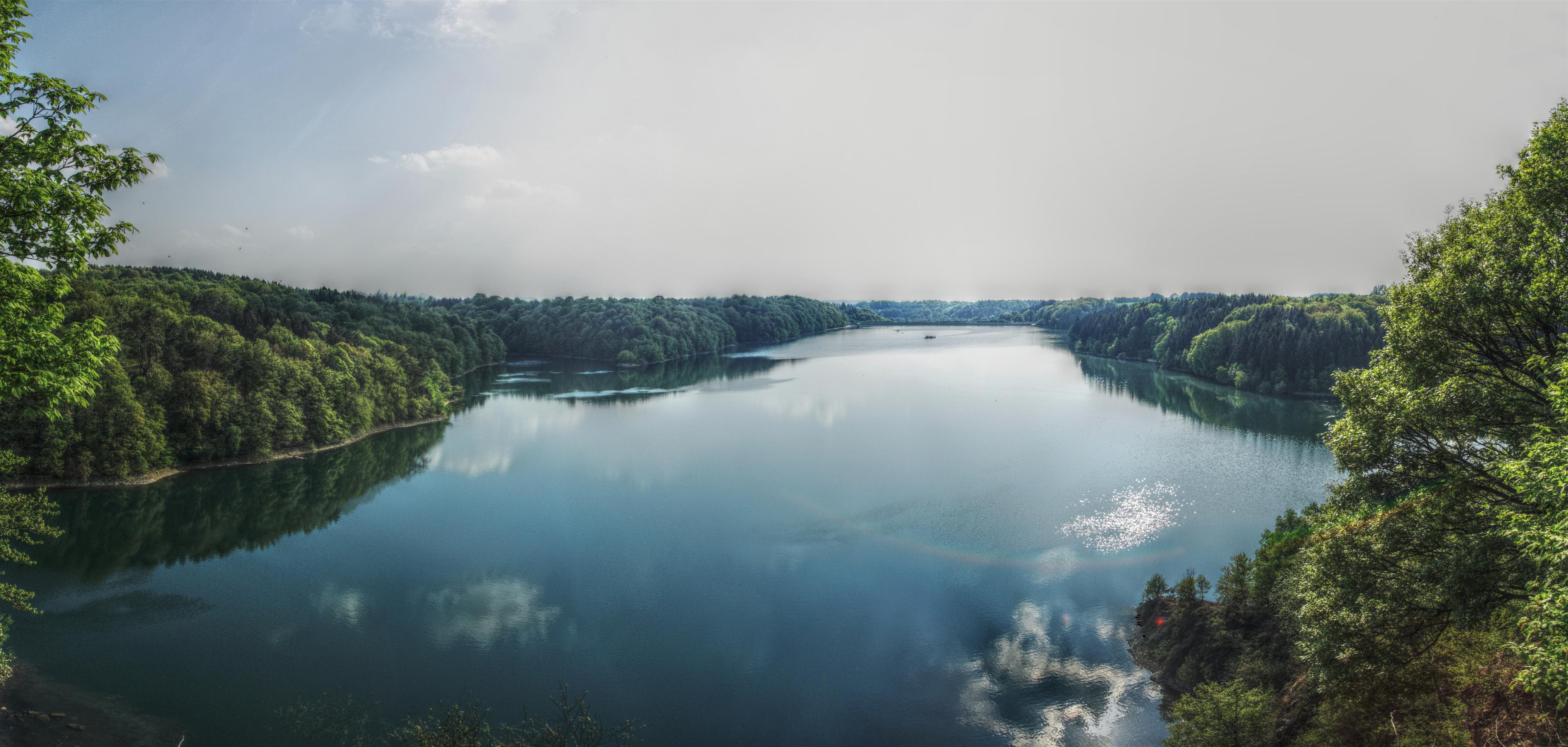 Wahnbachtalsperre im April 2011 von Pinn aus gesehen